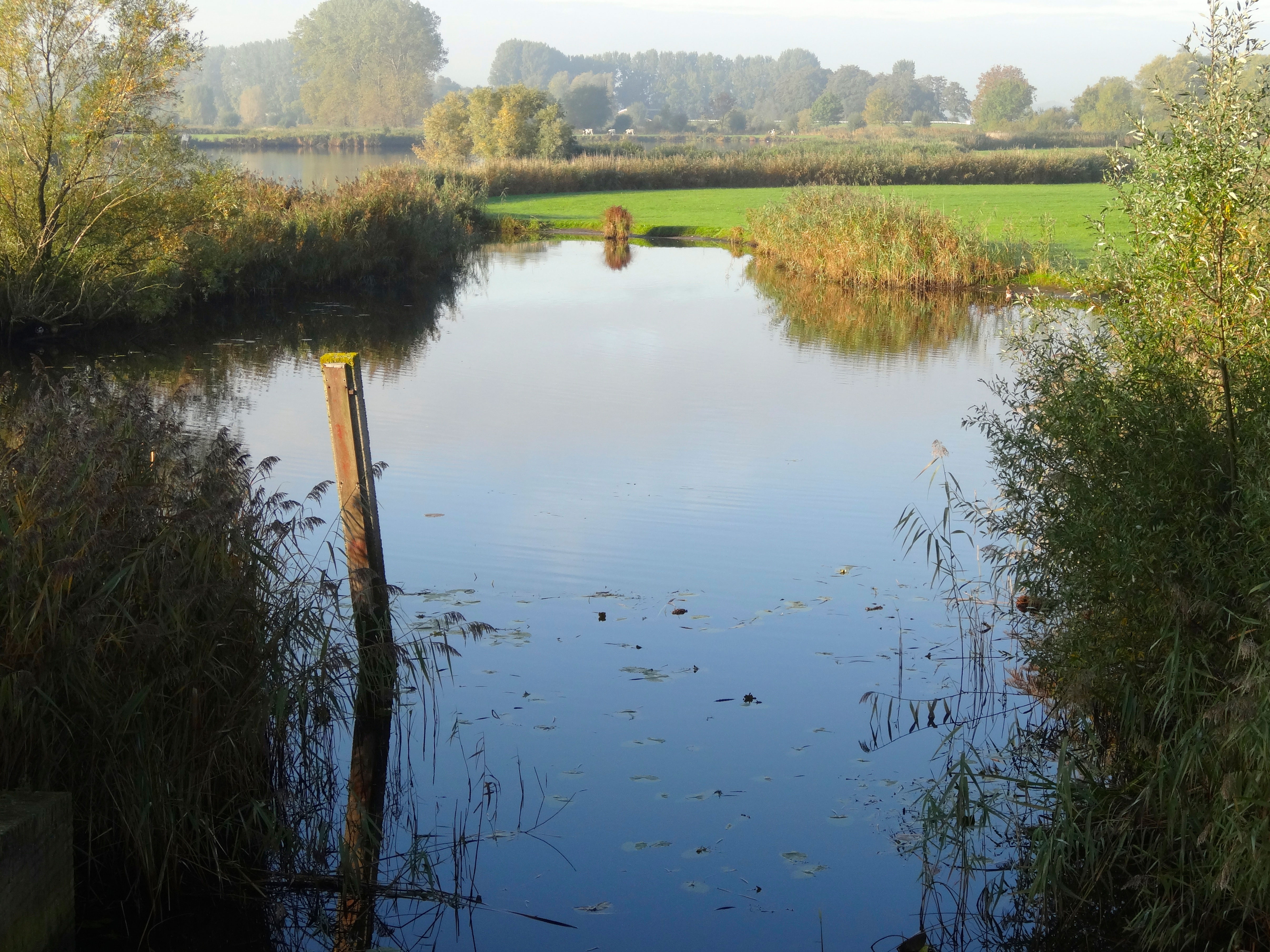 Streng met daarachter het Zwarte Water ten zuiden van Hasselt